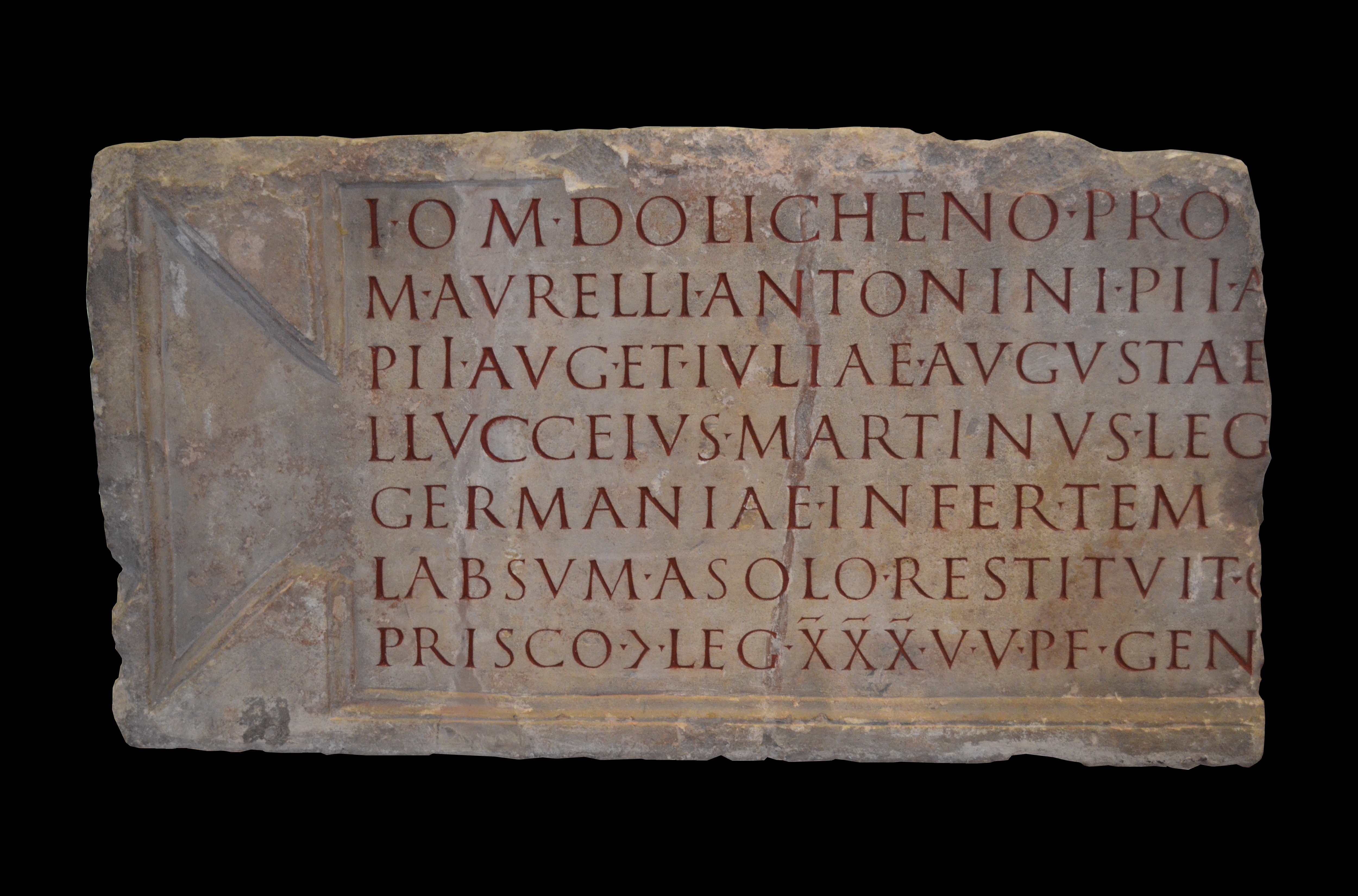 Musée romain-germanique de Cologne - Dédicace du temple à Jupiter Dolichénus